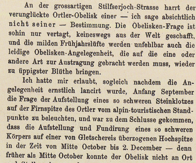 Oesterreichische Touristen-Zeitung, Dezember 1888, S. 276: Aufsatz von Julius Meurer gegen den Kaiser-Franz-Josephs-Obelisken am Ortler